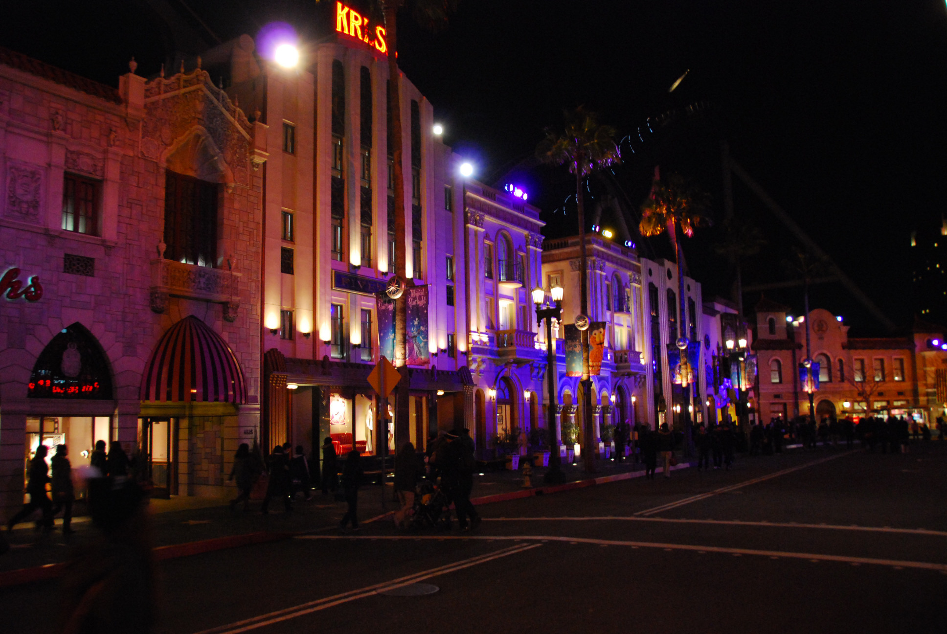 2 Chome Sakurajima, Konohana-ku, Ōsaka-shi, Ōsaka-fu 554-0031, Japan